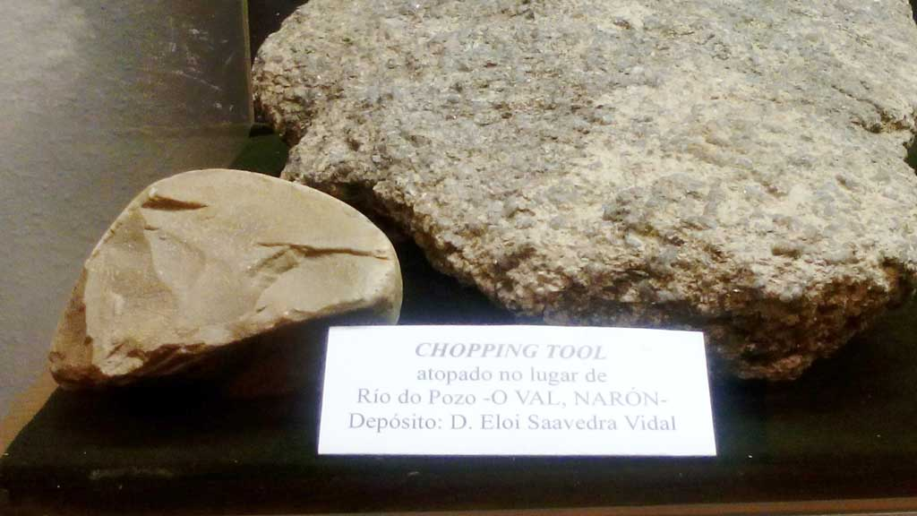 Chopping Tool do Val no Museo das Mariñas, Betanzos.